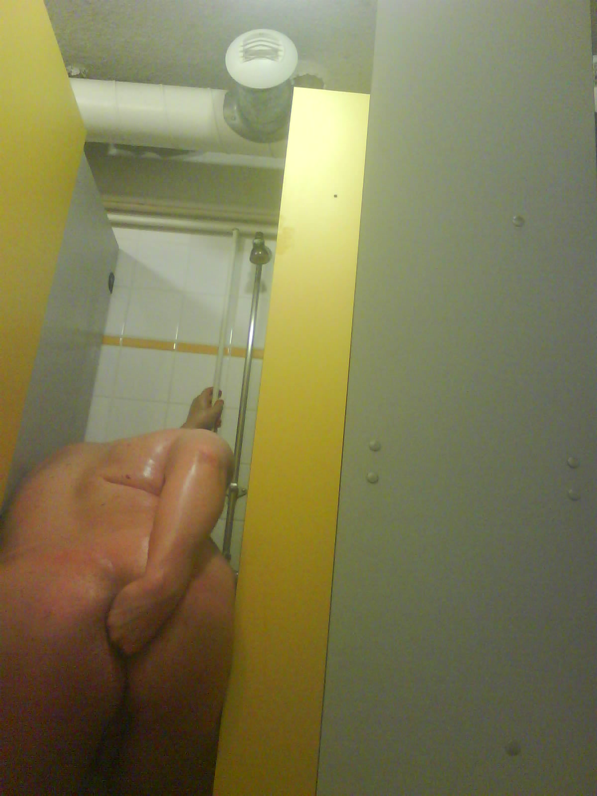 Petite séance de fist-fucking dans les douches collectives d'une cité universitaire à Toulouse.